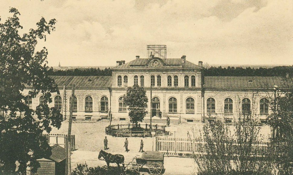 Беларуская (тарашкевіца): Ляндварова. Чыгуначная станцыя